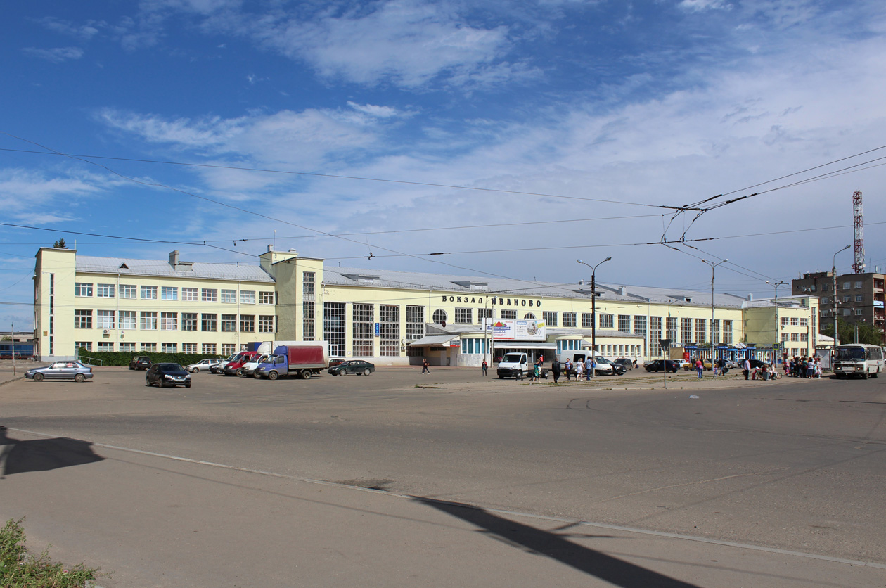 Иваново, Вокзальная площадь, 3; арх. В. М. Каверинский, 1931-1933-гг.